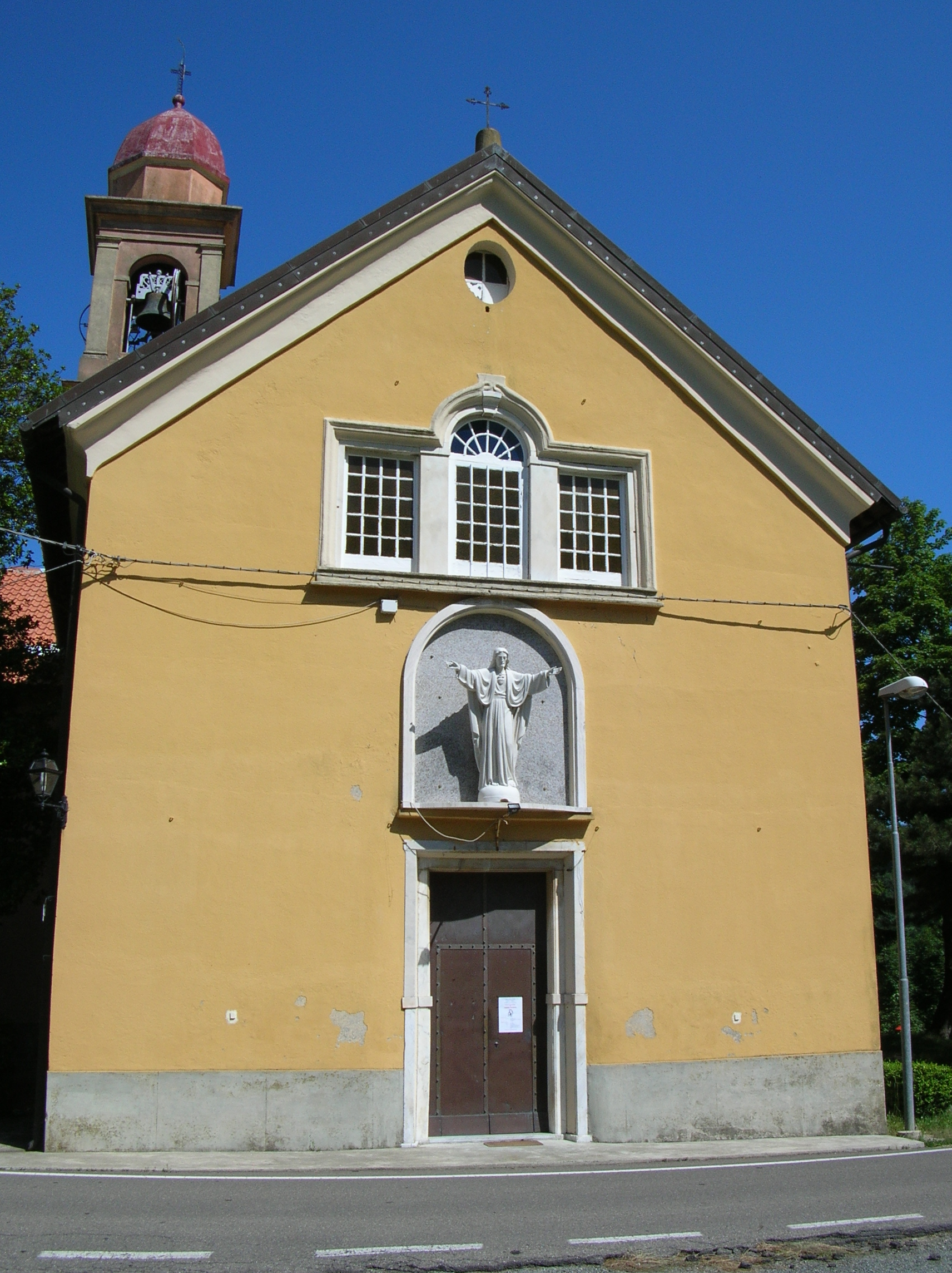 Bosio (provincia di Alessandria), la chiesa di S. Croce nella località Capanne di Marcarolo